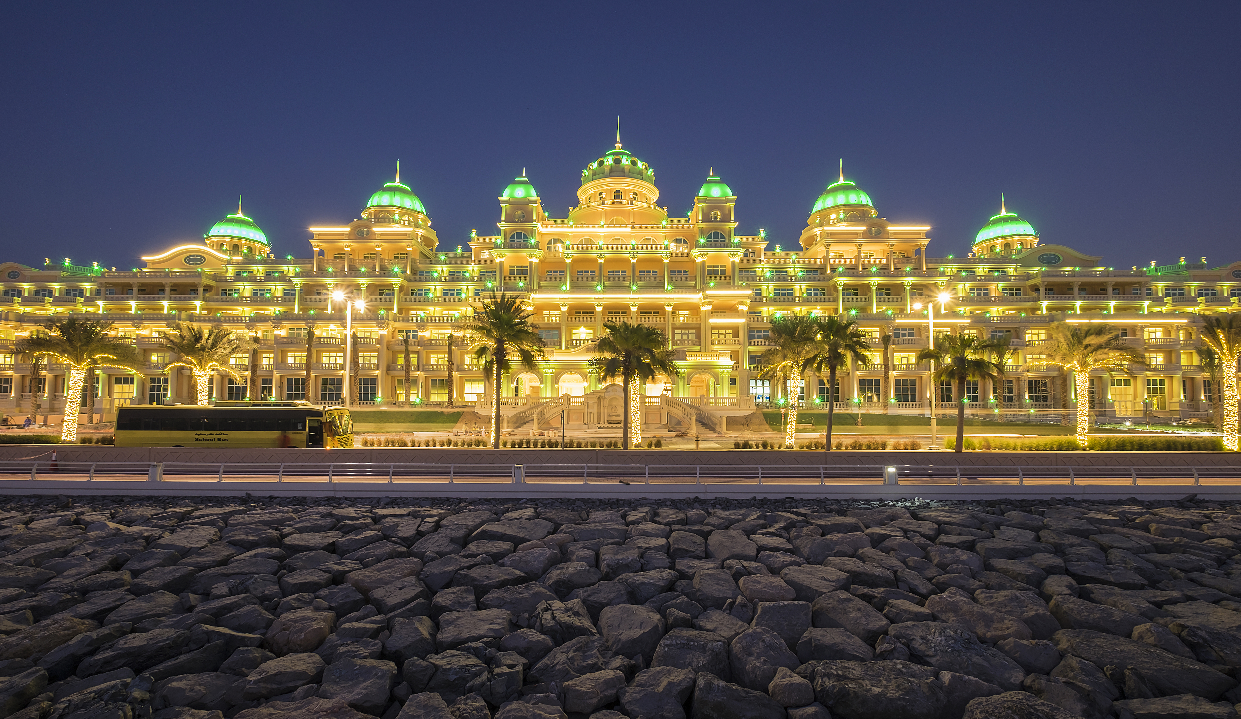 Էմերալդ Փելես Կեմպինսկի